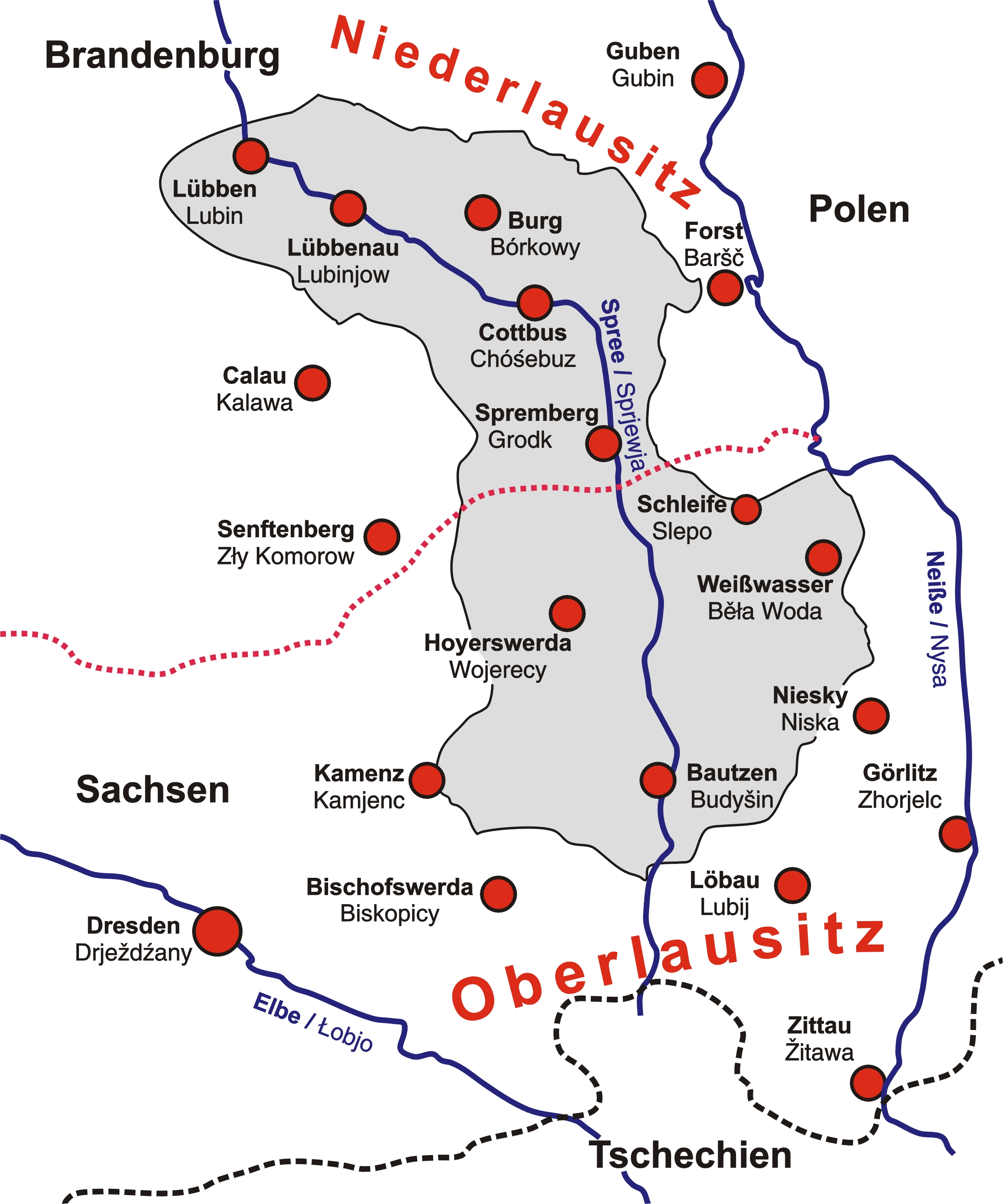 Sorbisches Siedlungsgebiet, redigierte Karte